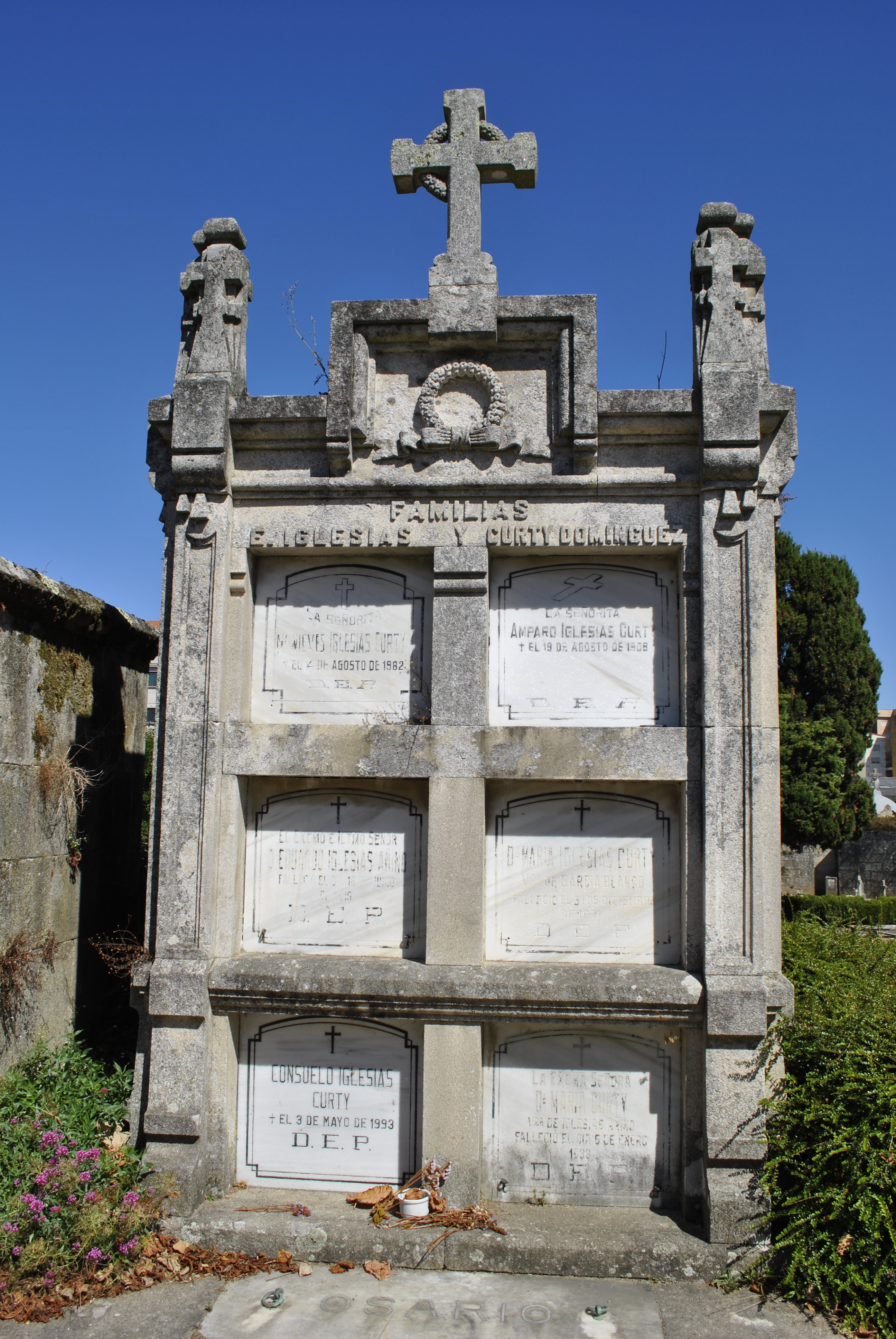 Familias E. Iglesias y Curty Domínguez.jpg